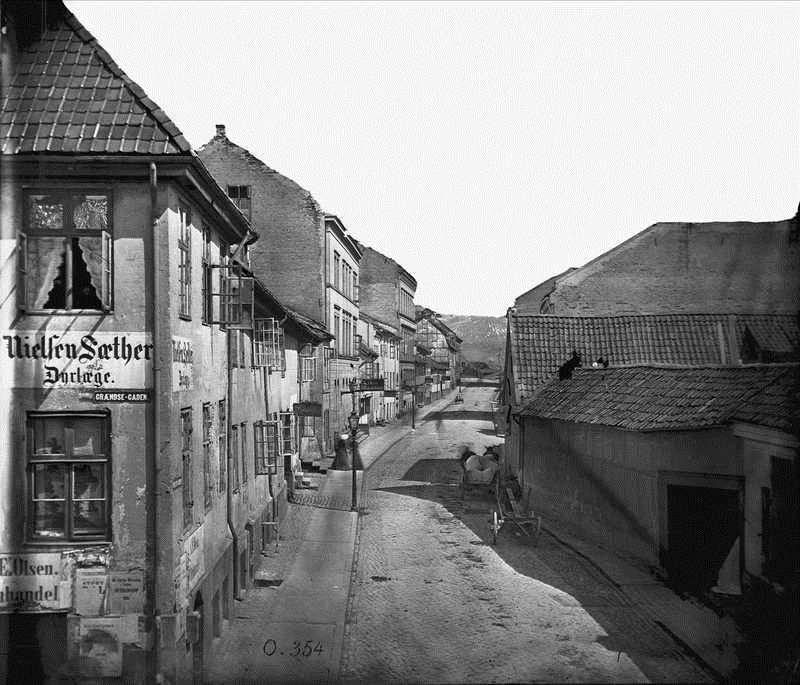 Møllergata i Christiania (Oslo), gateløp, bygårder, håndverkerskilt, gatebelysning. Avbildet sted: Møllergt. 2, Grensen 1, Møllergt. 3, Møllergt. 1, Møllergt. 7, Møllergt. 9